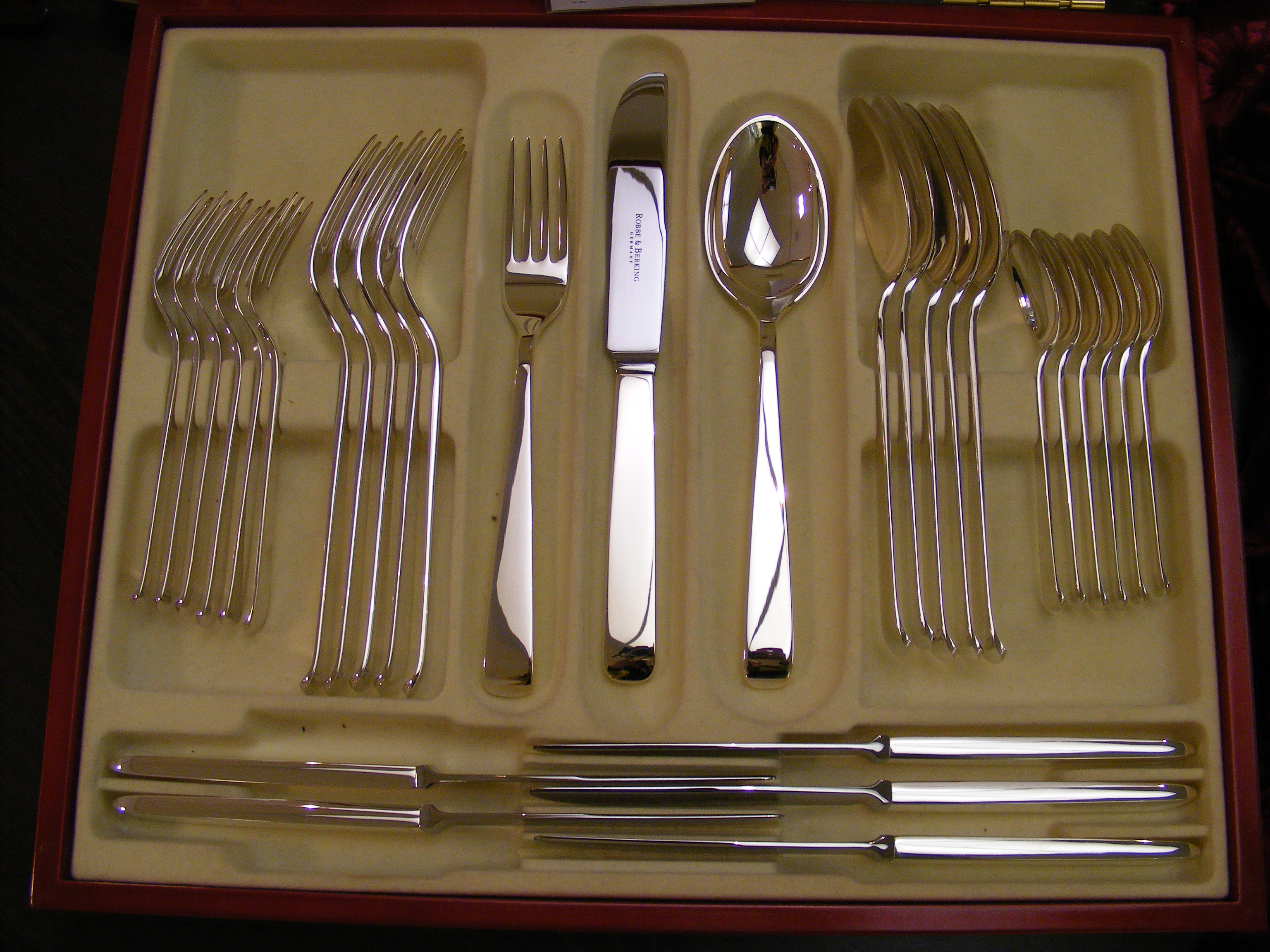 Besteckserie "Alta" von Robbe & Berking